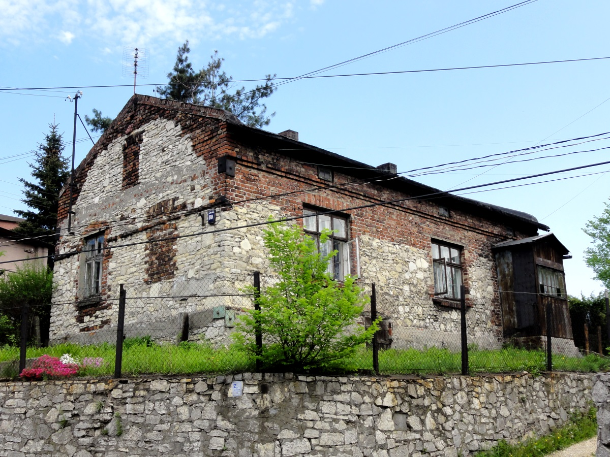 Dom przy ul. Wiejskiej w Porąbce (Sosnowiec)